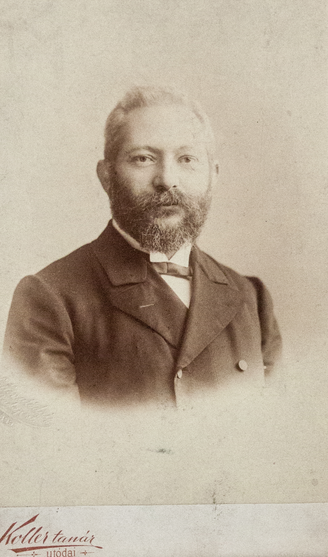 David Kaufmann